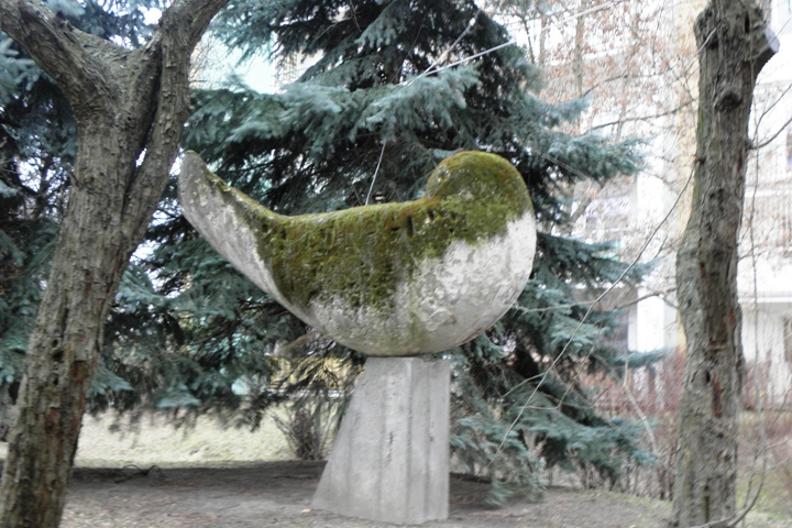 rzeźba pełna, wolno stojąca - rzeźbiarz Władysław Trojan